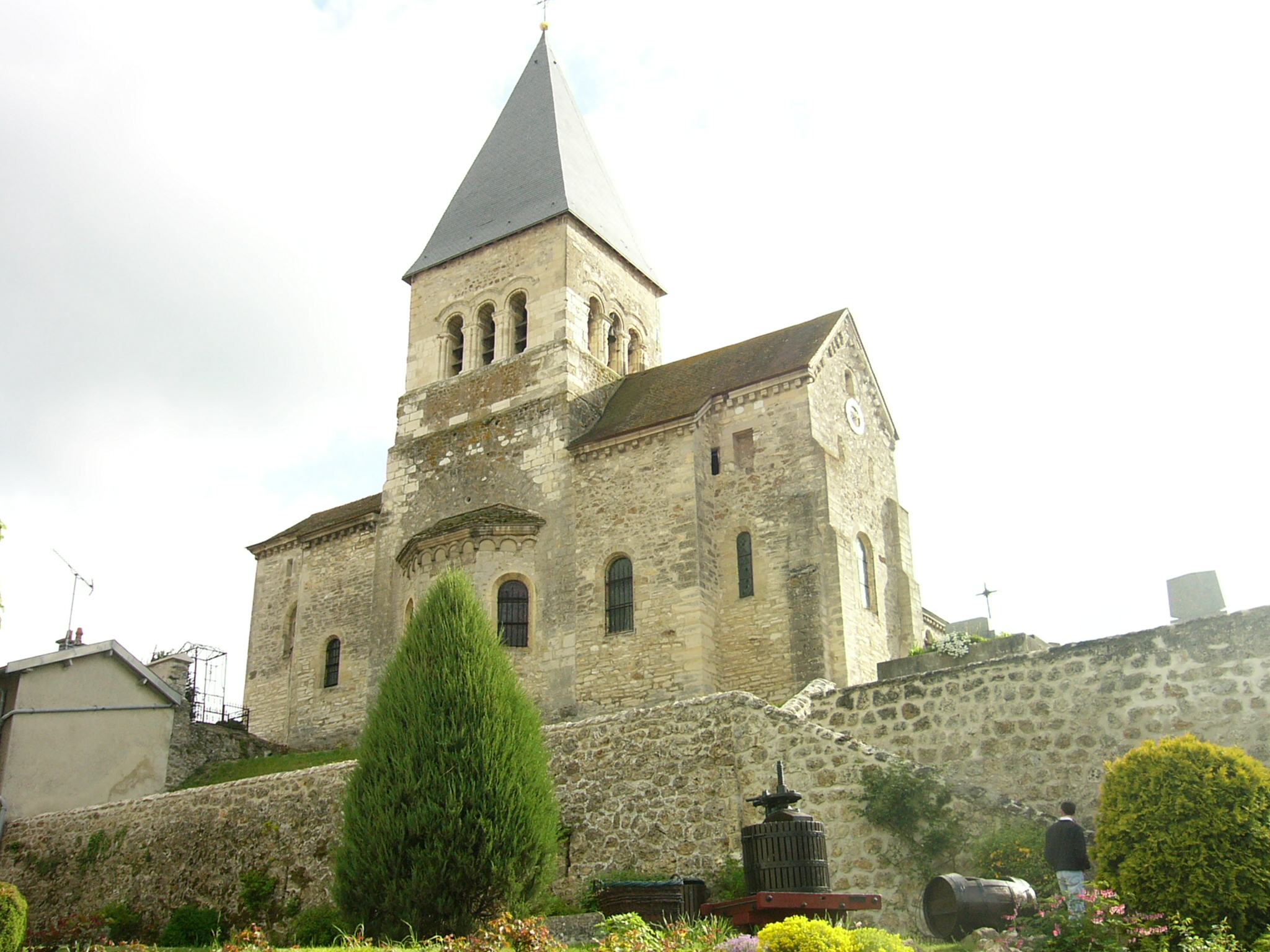 Église de Sacy (à côté de reims)